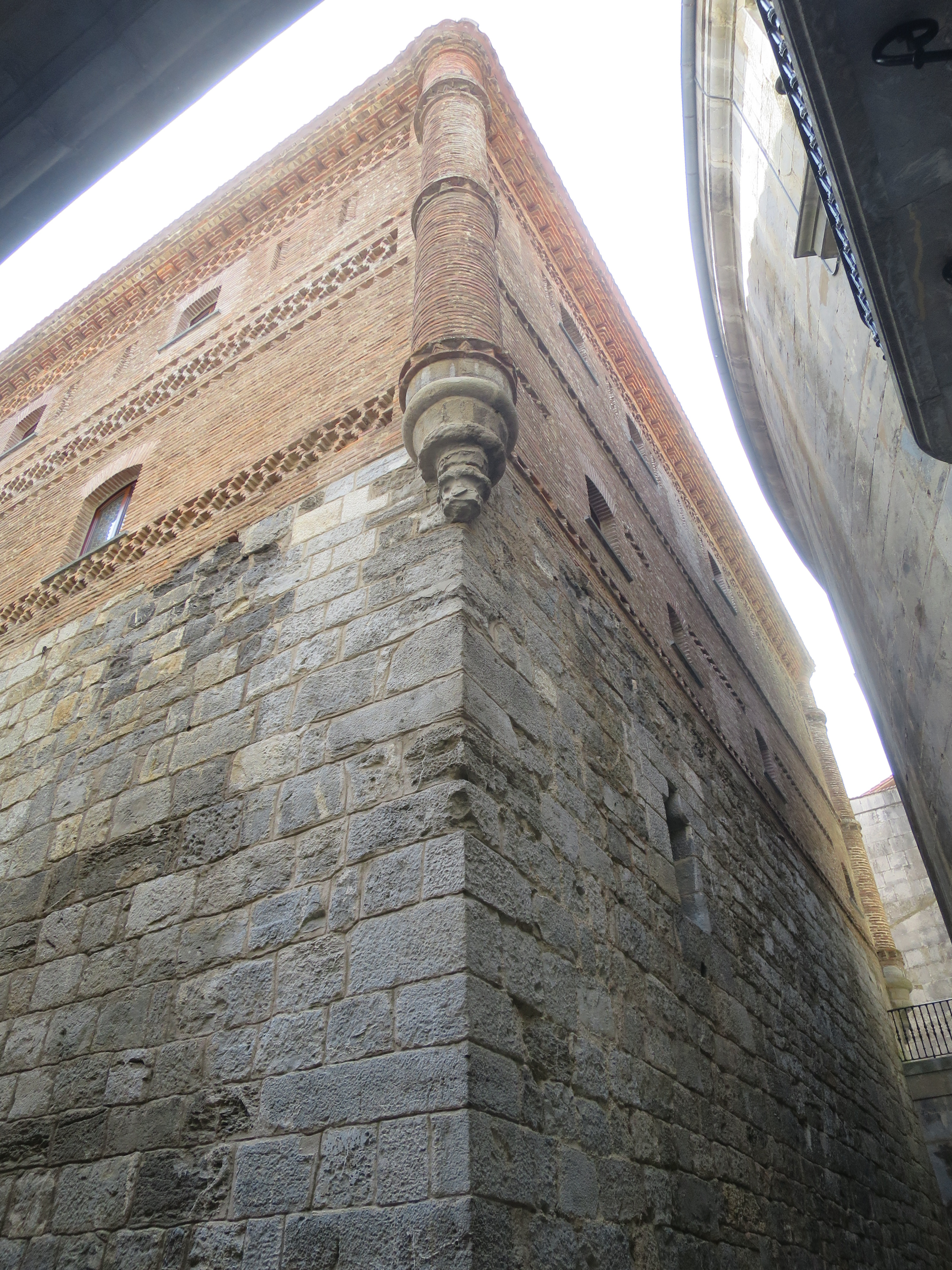 Der von dem umgebenden Kollegiengebäude eingefasste mittelalterliche Wohnturm der Familie Loyola, Geburtsort von Ignatius von Loyola